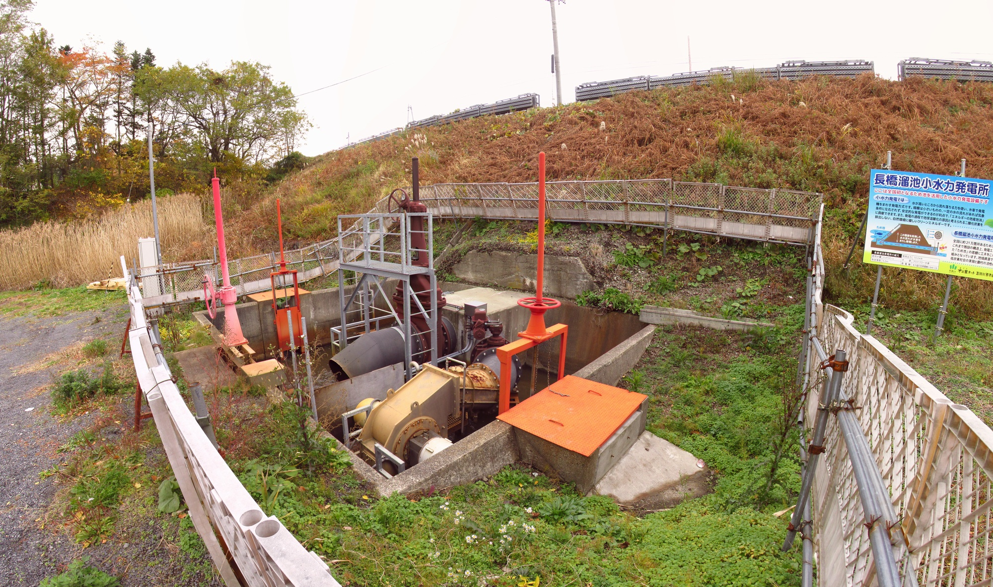 長橋溜池小水力発電所,日本国,青森県五所川原市,使用水量0.41立方メートル／毎秒,有効落差５メートル,常時出力１０ｋＷ,水車：クロスフロー水車,発電機,永久磁石発電機６ｋＷx２基,五所川原土地改良区,水土里ネット五所川原南部,日本で２１万箇所ある溜池の中で初となる小水力発電所。